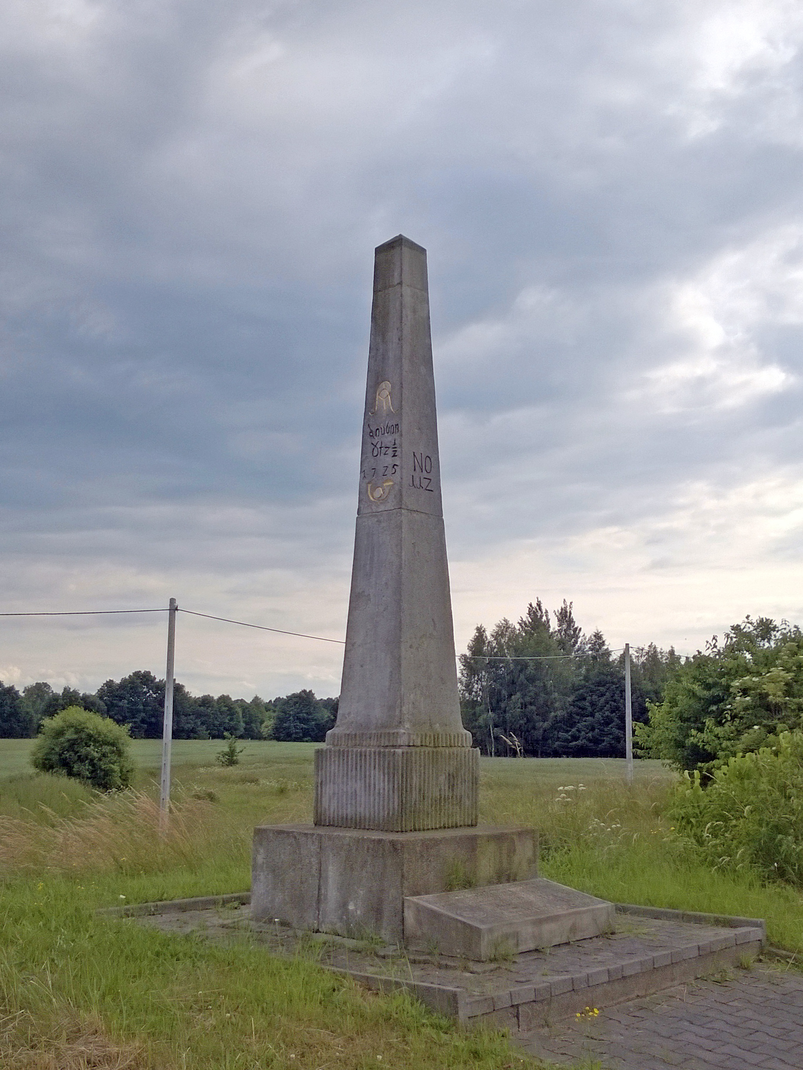 Nowogrodziec Ołdrzychów - saski słup milowy